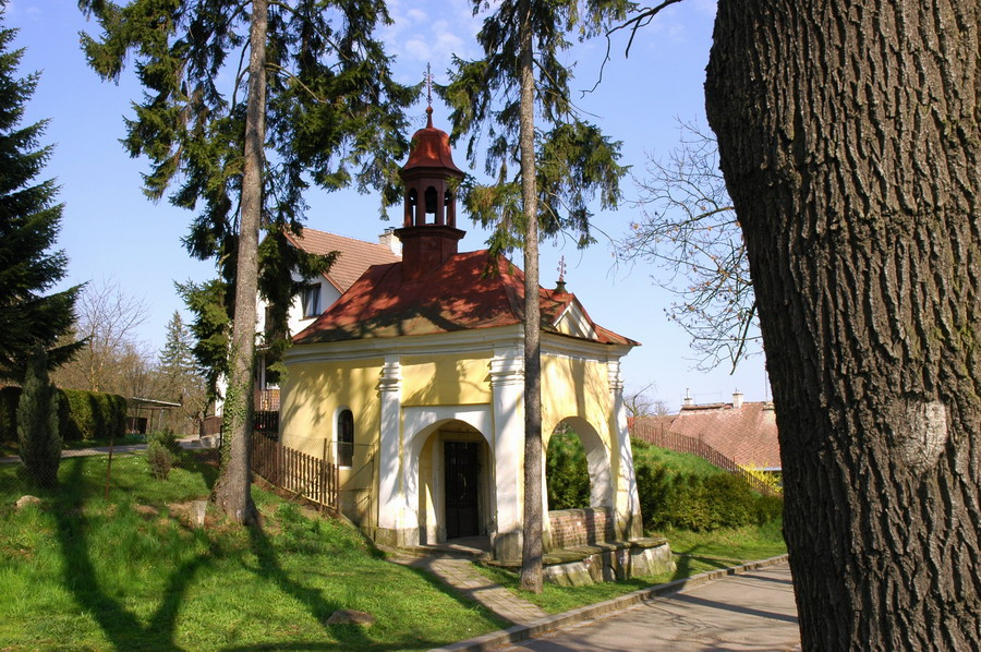 Jaroměř-Pražské Předměstí, kaple sv. Anny, ulice U Sv. Anny, u domu Na Klouzkově č. p. 156.